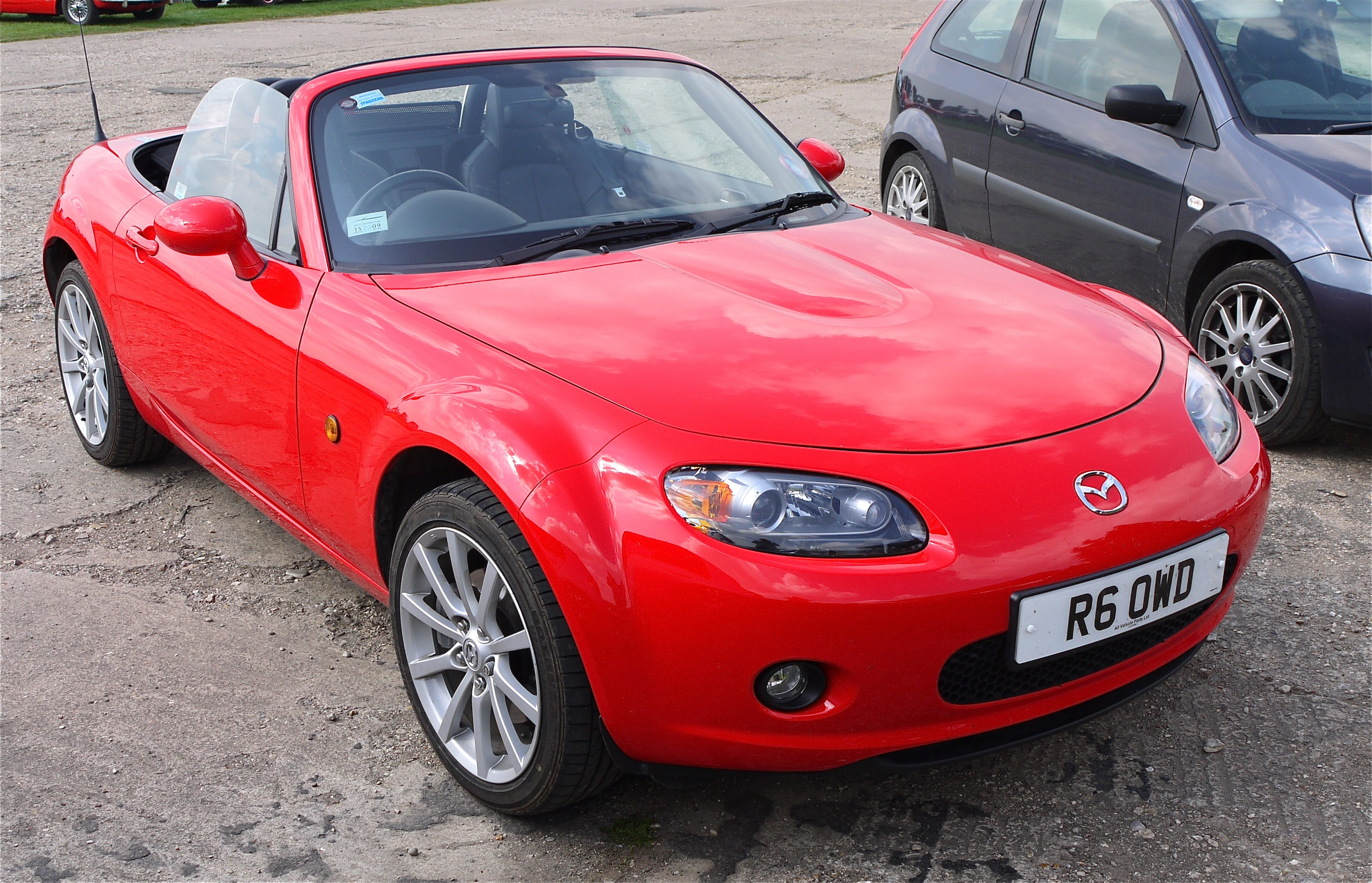 Panasonic G1 14-45 Lens